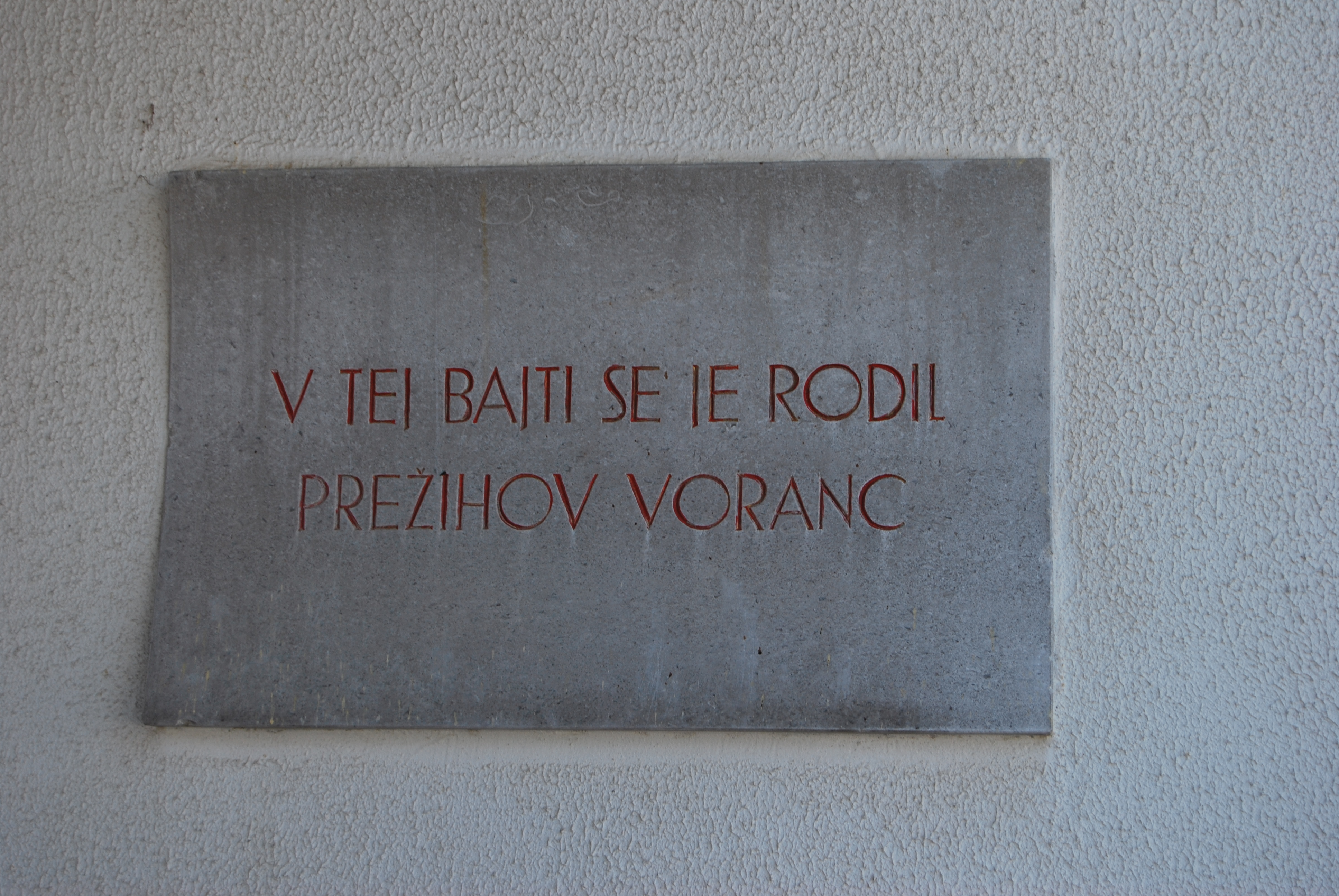 Spominska plošča na rojstni hiši Prežihovega Voranca.